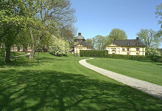 Slottets två sjöflyglar. Motiv: Drottningholm Nyckelord: Byggnadsminnen:Statl, Världsarv Kategori: Slott- och herrgårdsträdgårdSlottets två sjöflyglar.